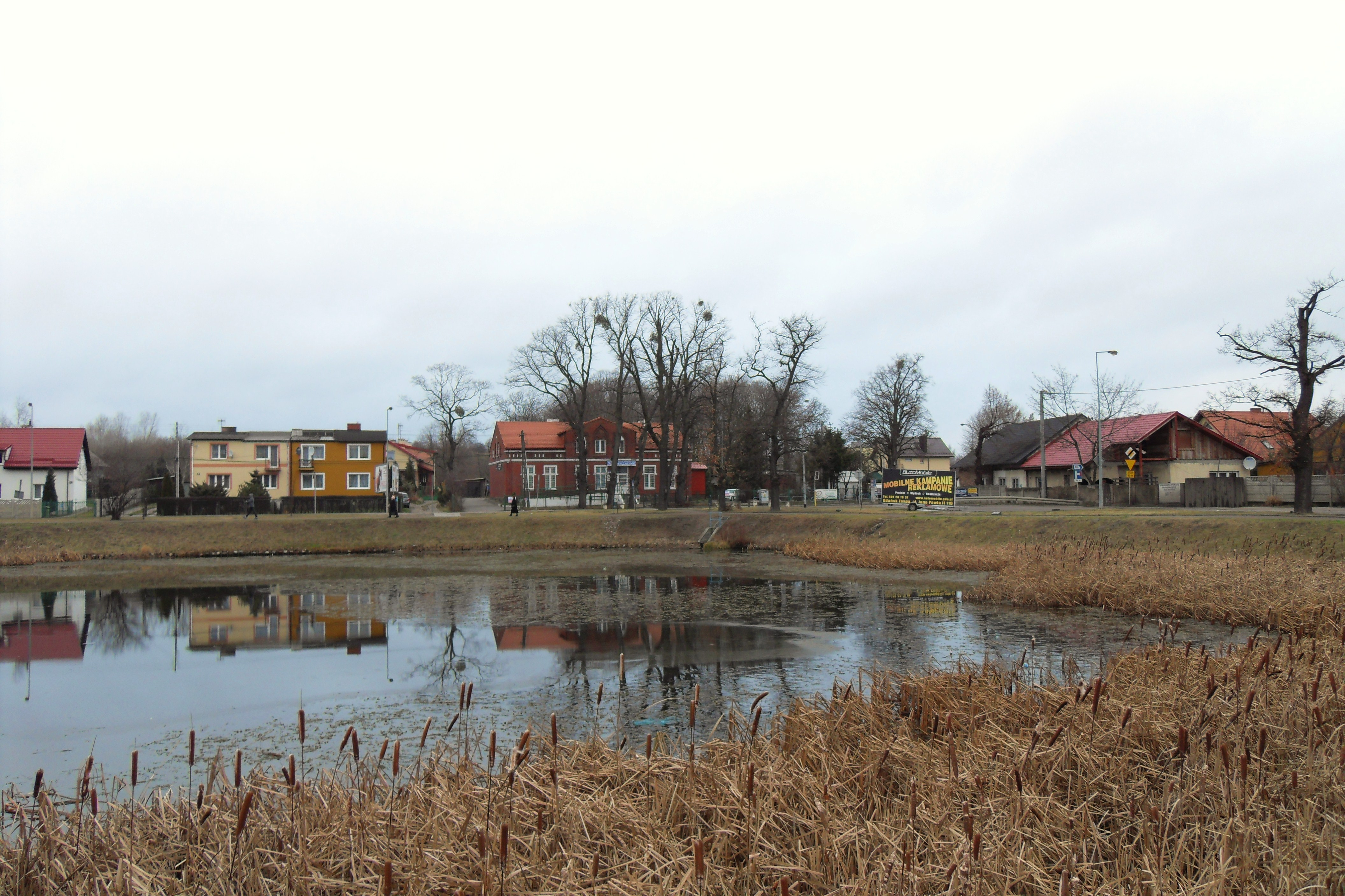 Gdańsk Stare Ujeścisko, dawny staw.